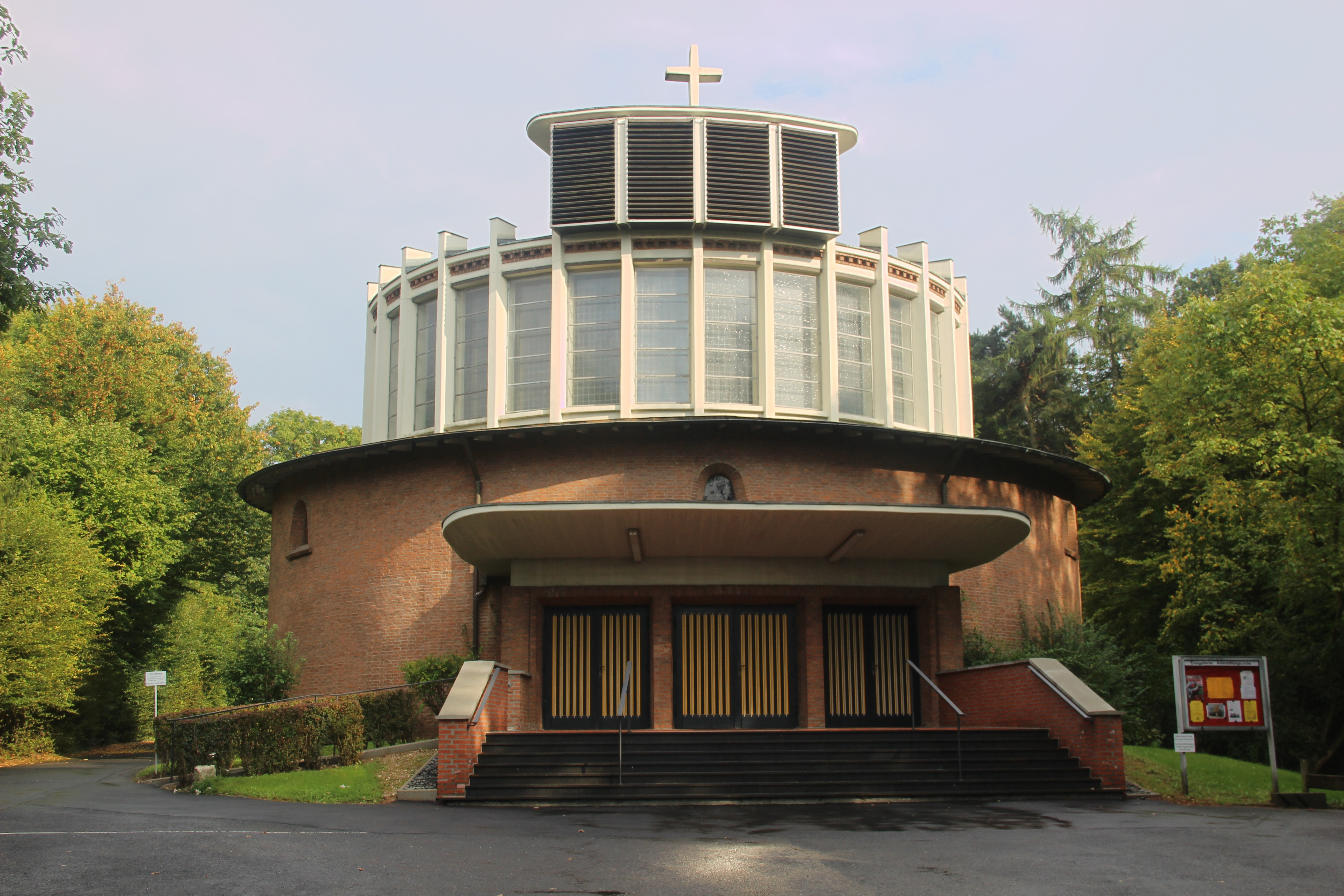 Die evangelische Auferstehungskirche im Bonner Ortsteil Venusberg, Haager Weg 69a–71